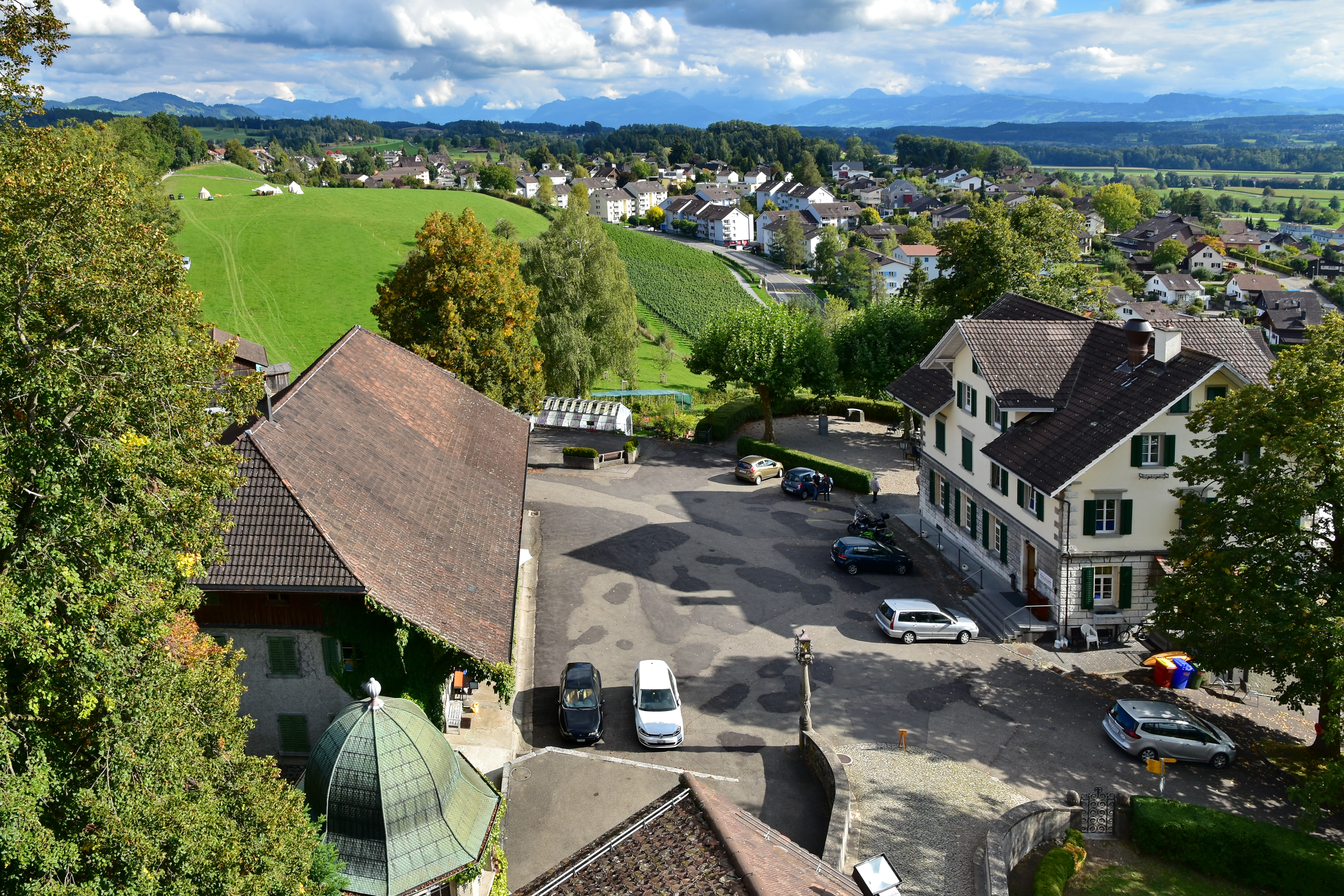 Schloss (Castle) in Uster (Switzerland)